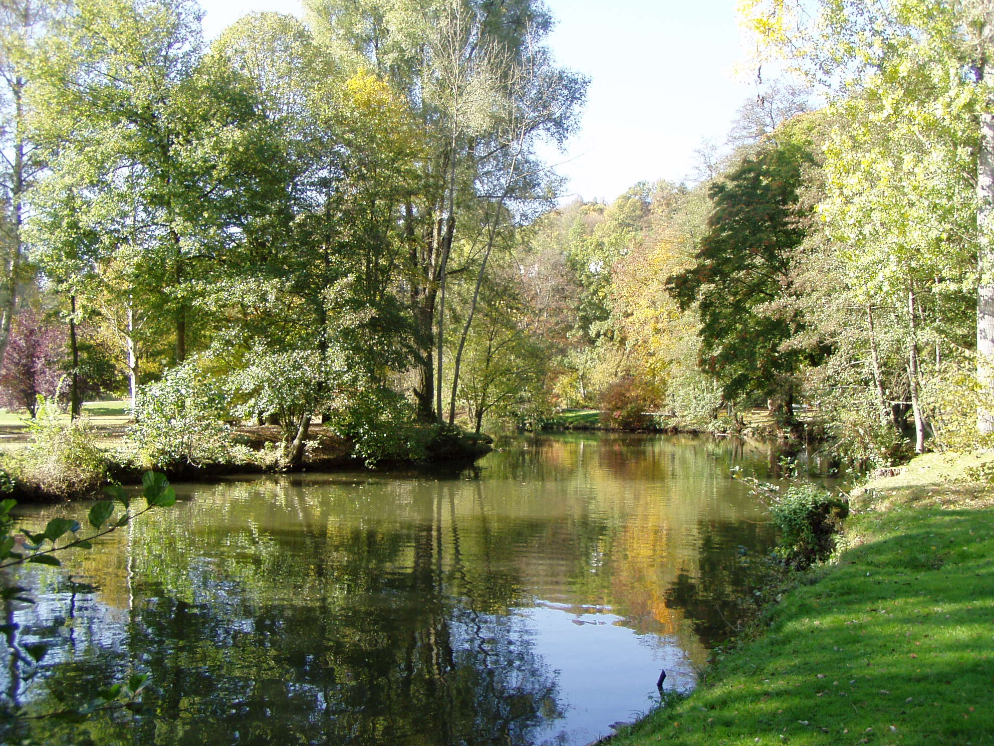 Fränkische Saale in Bad Kissingen / Franconian river Saale in Bad Kissingen